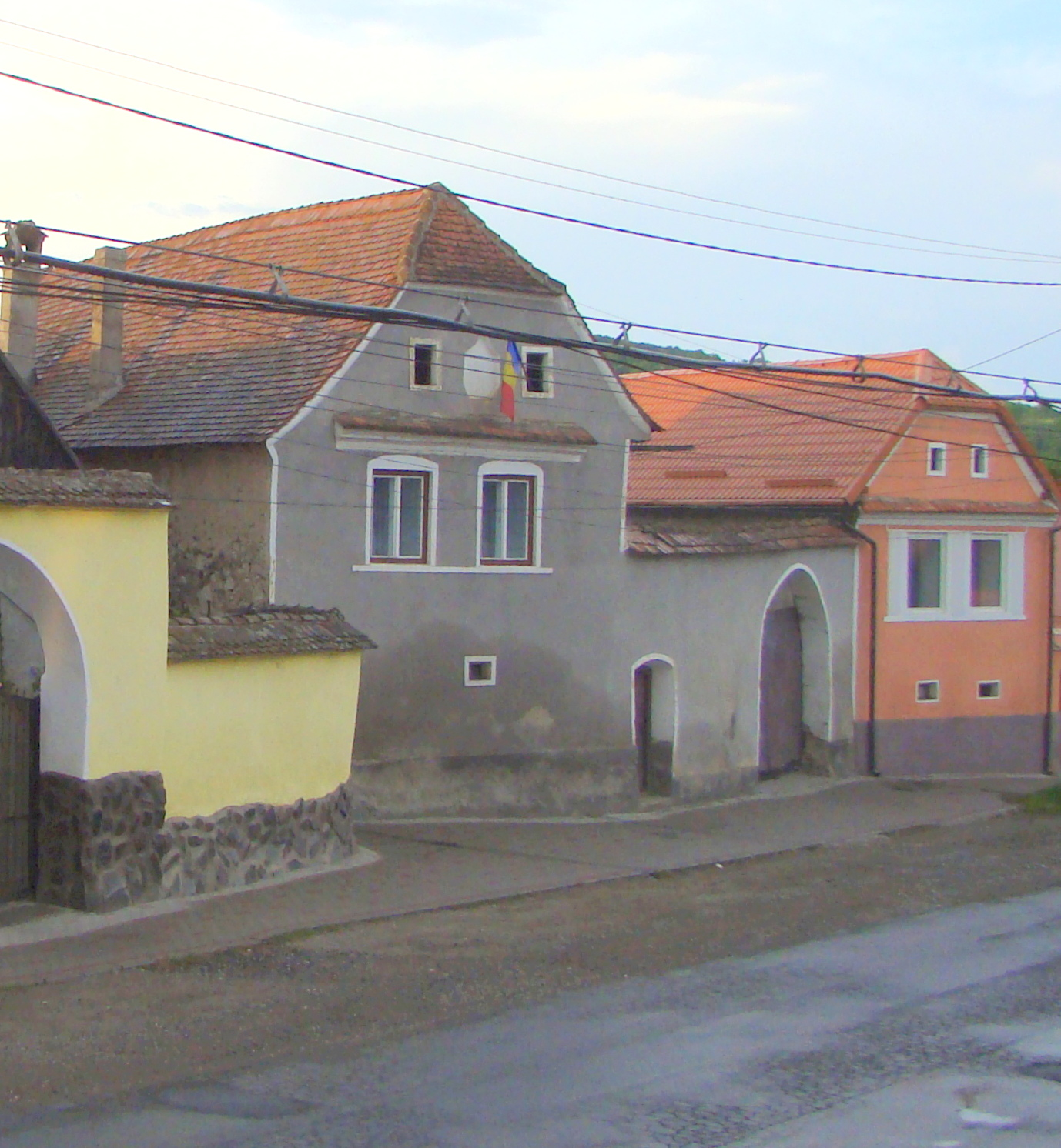 Casă, sat Homorod; comuna Homorod 286 sec. XVIII